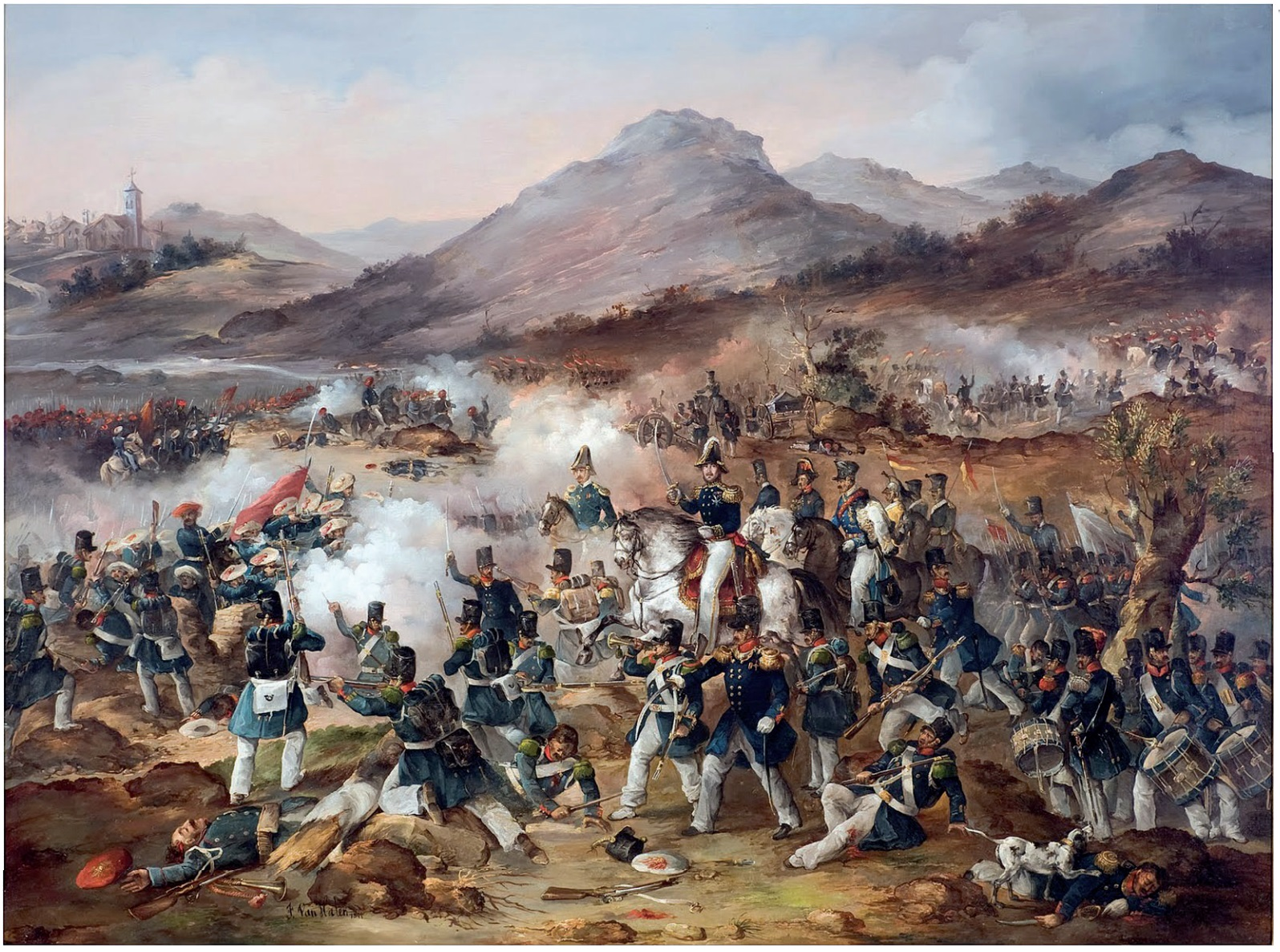 Primera Guerra Carlista. Batalla de Ramales por Francisco de Paula Van Halen